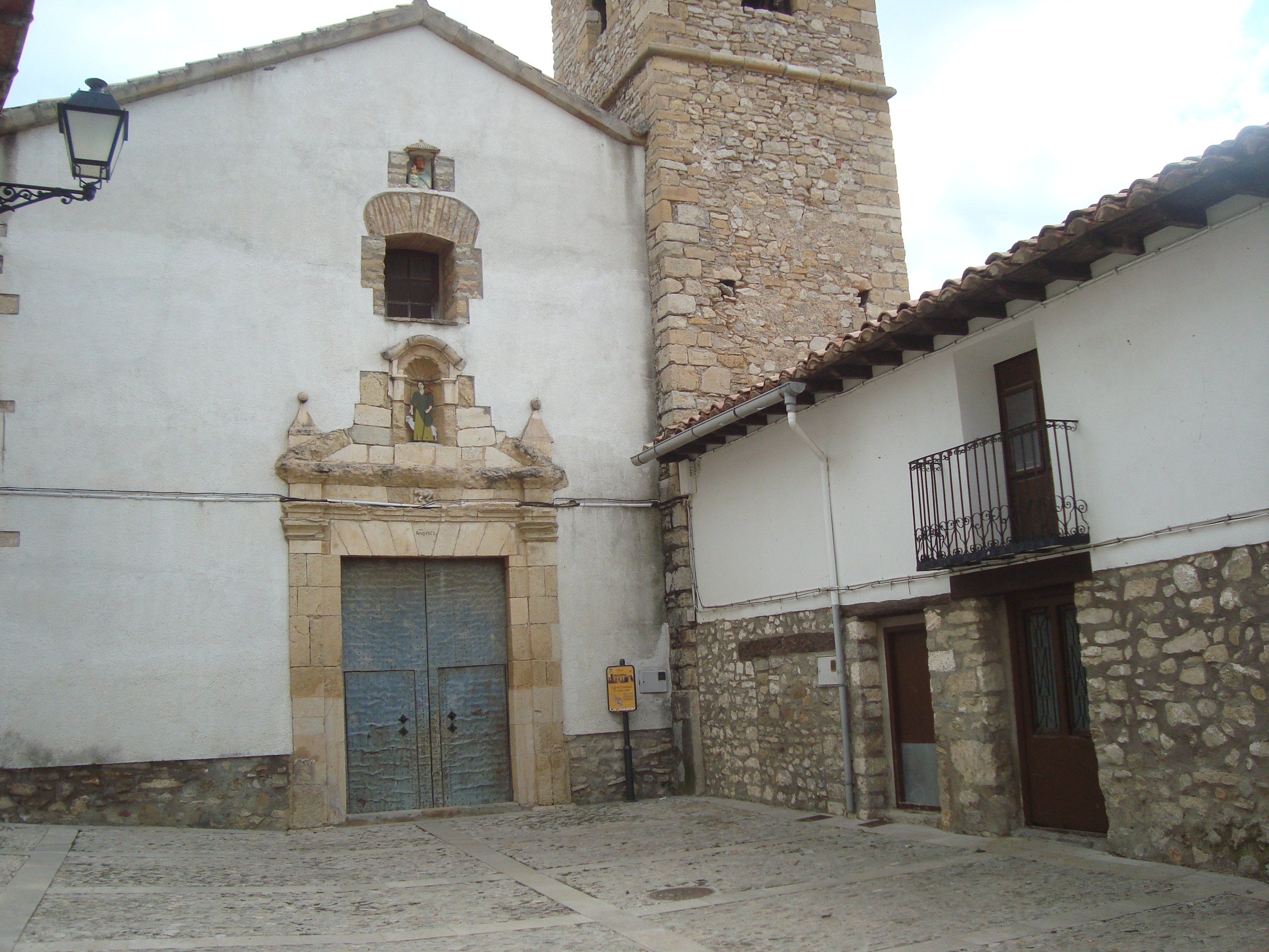 Església parroquial dels Sants Joans (Villores) 01.137-001.